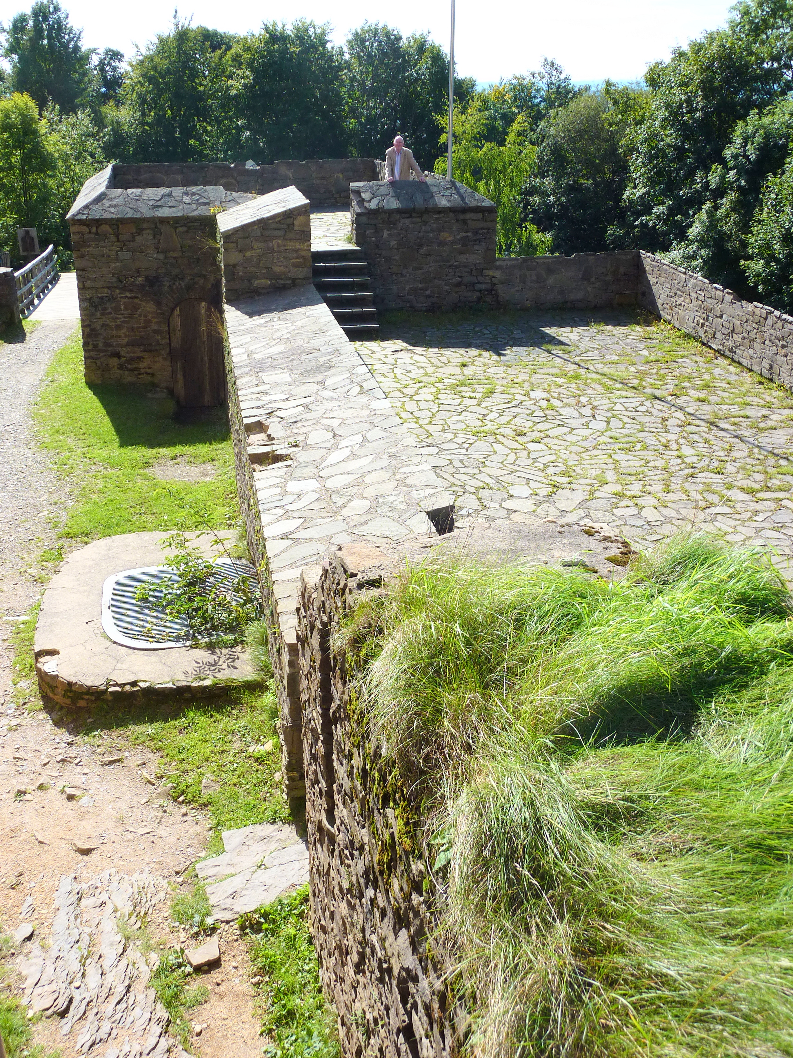 Gemeinde Grund (Hilchenbach)/Westfalen: Die Ginsburg-Ruine, vom 13. bis 17. Jahrhundert Grenzfestung des Hauses Nassau auf dem Schlossberg. Innerer Burghof mit den im 20. Jahrhundert nachträglich auf den Resten der Grundmauern aufgemauerten nachempfundenen Gebäuden. Ansicht von Nordosten. Rechts im Bild die Nachbildung eines Langhauses, dahinter die des vermuteten Palas der Burg. Mitte links der Brunnen im Burghof.